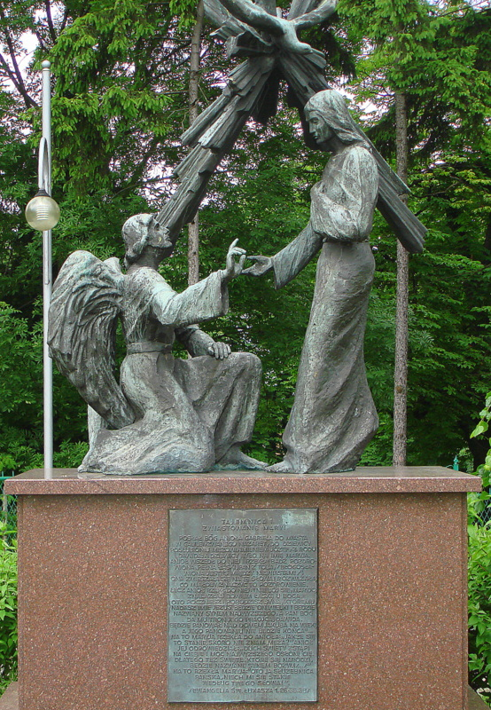 Częstochowa, zespół klasztorny paulinów na Jasnej Górze